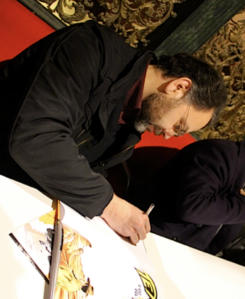 Pasquale Frisenda firma autografi a Piacenza Comics nel 2016.